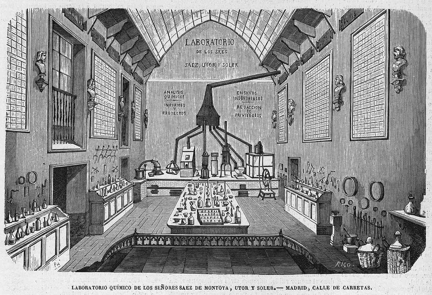 Laboratorio químico de los señores Saez de Montoya, Utor y Soler. — Madrid, calle de Carretas., en la revista española El Museo Universal.